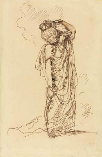 Femme arabe portant une amphore, 1847